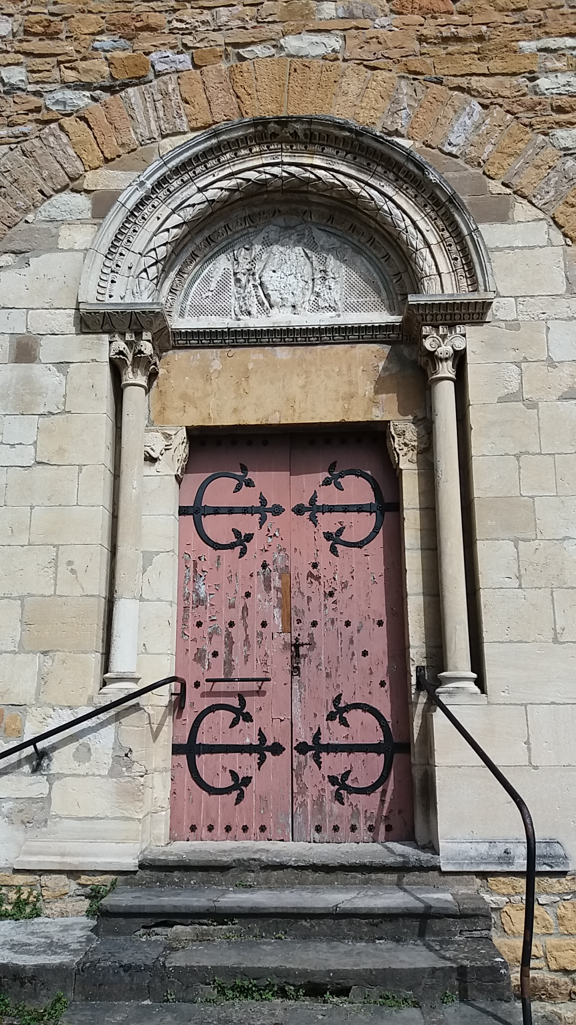 Porte ouest.